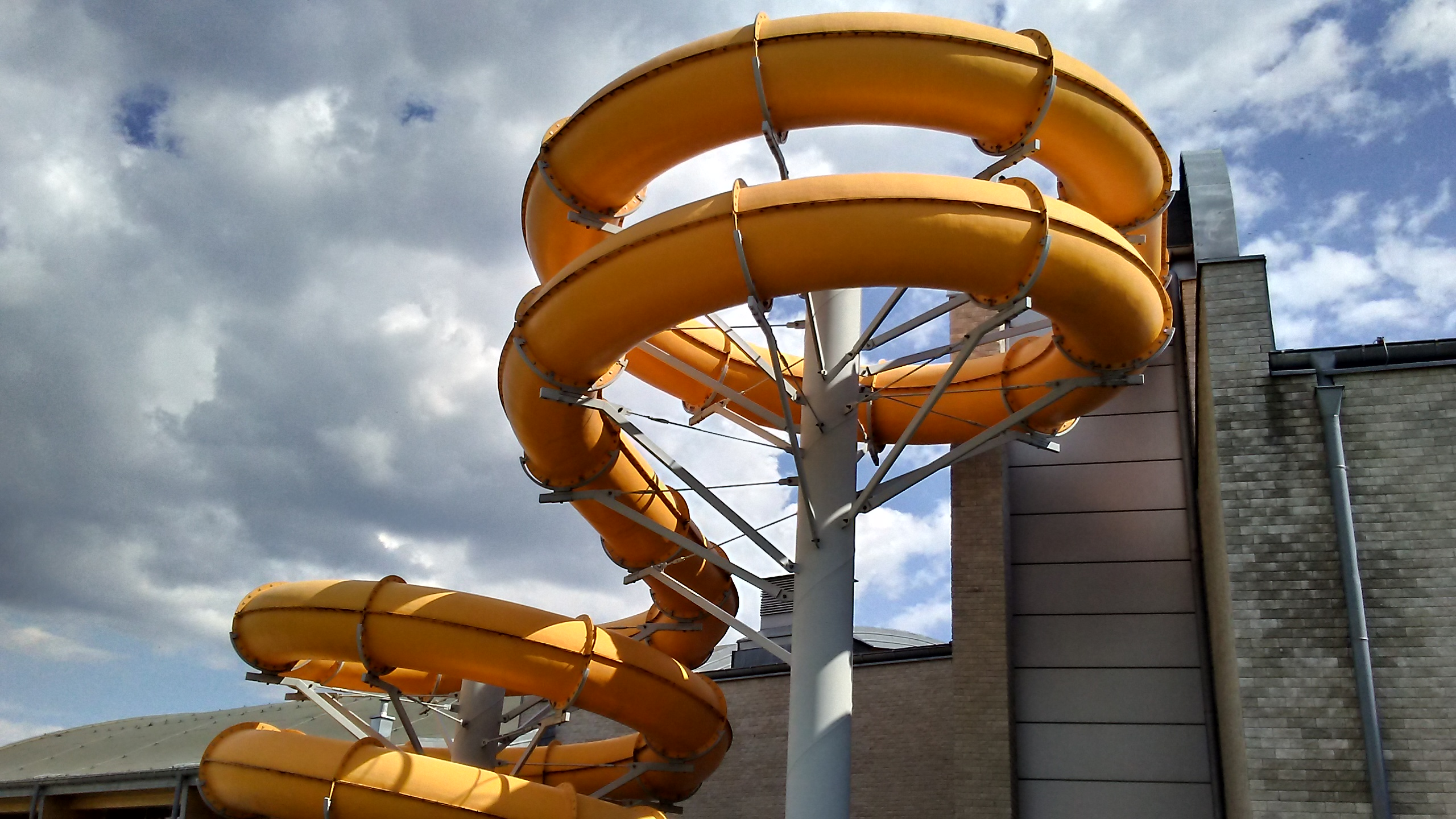 Zjeżdżania przy basenie na osiedlu Niebrów, Tomaszów Mazowiecki